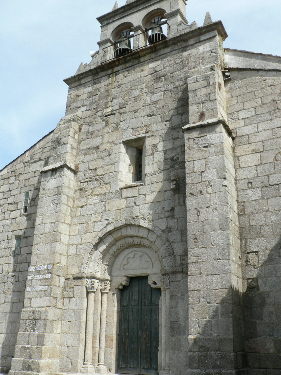 Bergondo, arquitectura relixiosa Categorí­a:Imaxes de Bergondo